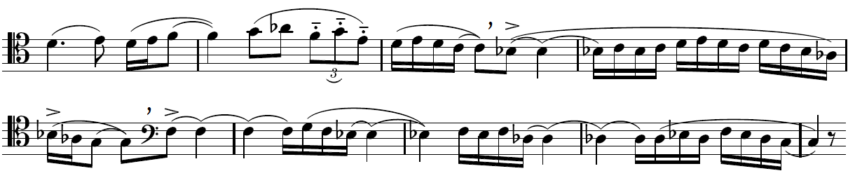 Conséquent du thème B du Boléro de Ravel